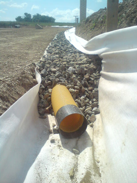 Zasypaná drenážová hadice